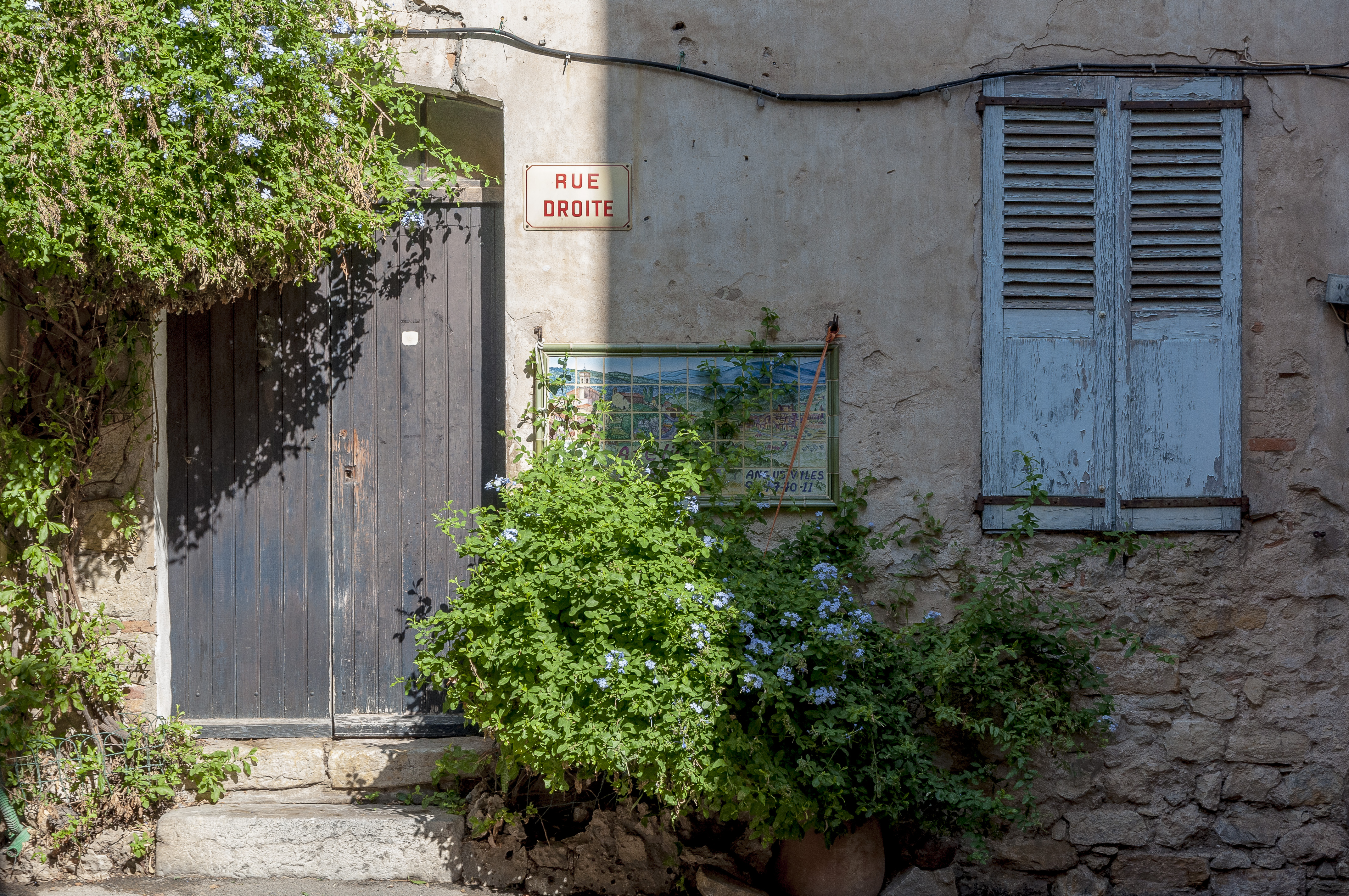 Village de l'est varois, limitrophe des Alpes-Maritimes.